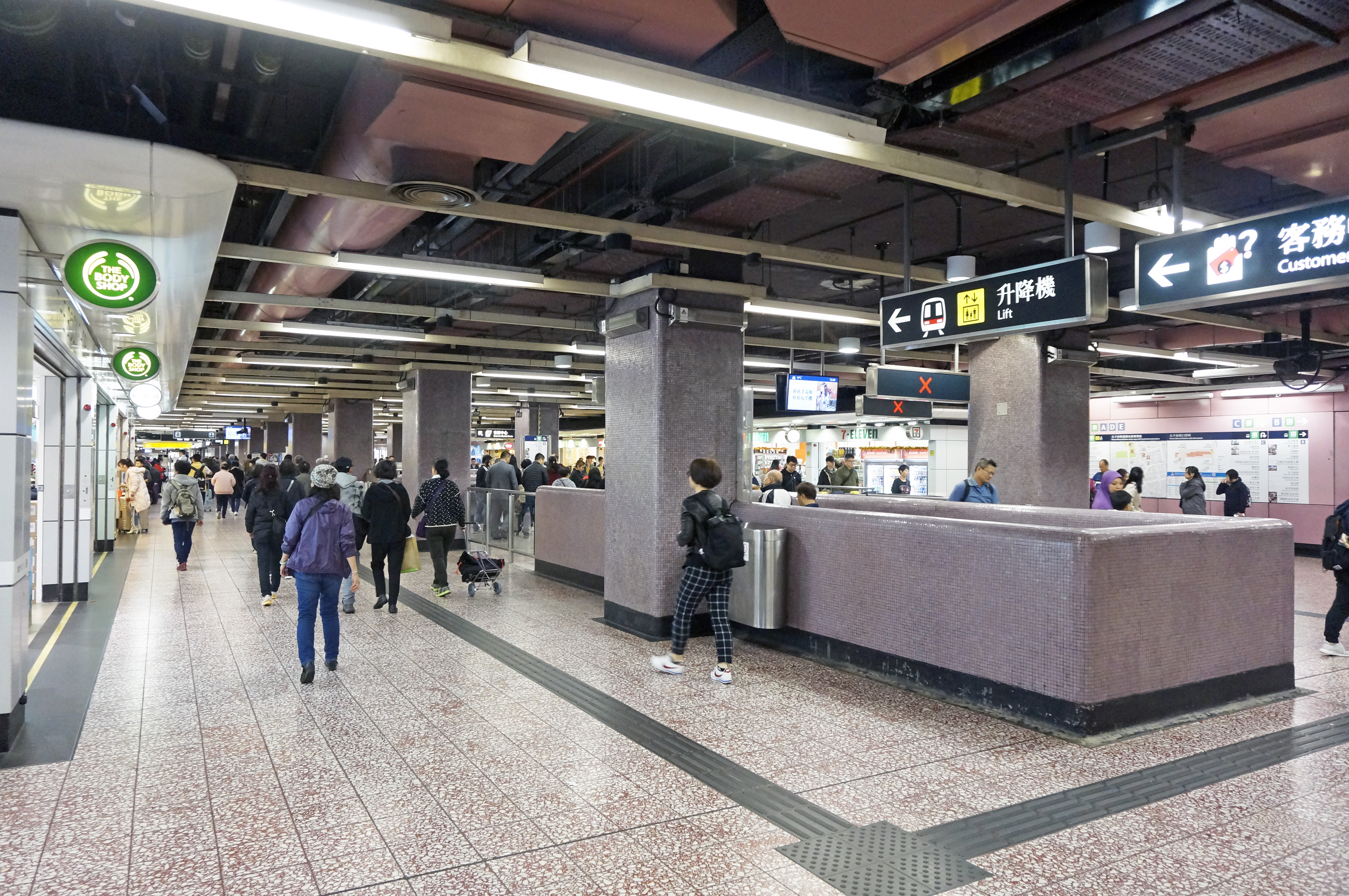 港鐵太子站大堂